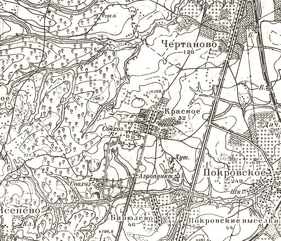 Москва и окрестности, 1931 год, фрагмент: Красное (сейчас Чертаново).